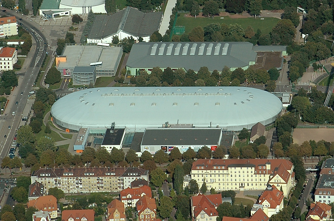 Luftbild von der Gunda-Niemann-Stirnemann-Halle in der Arnstädter Straße in Erfurt